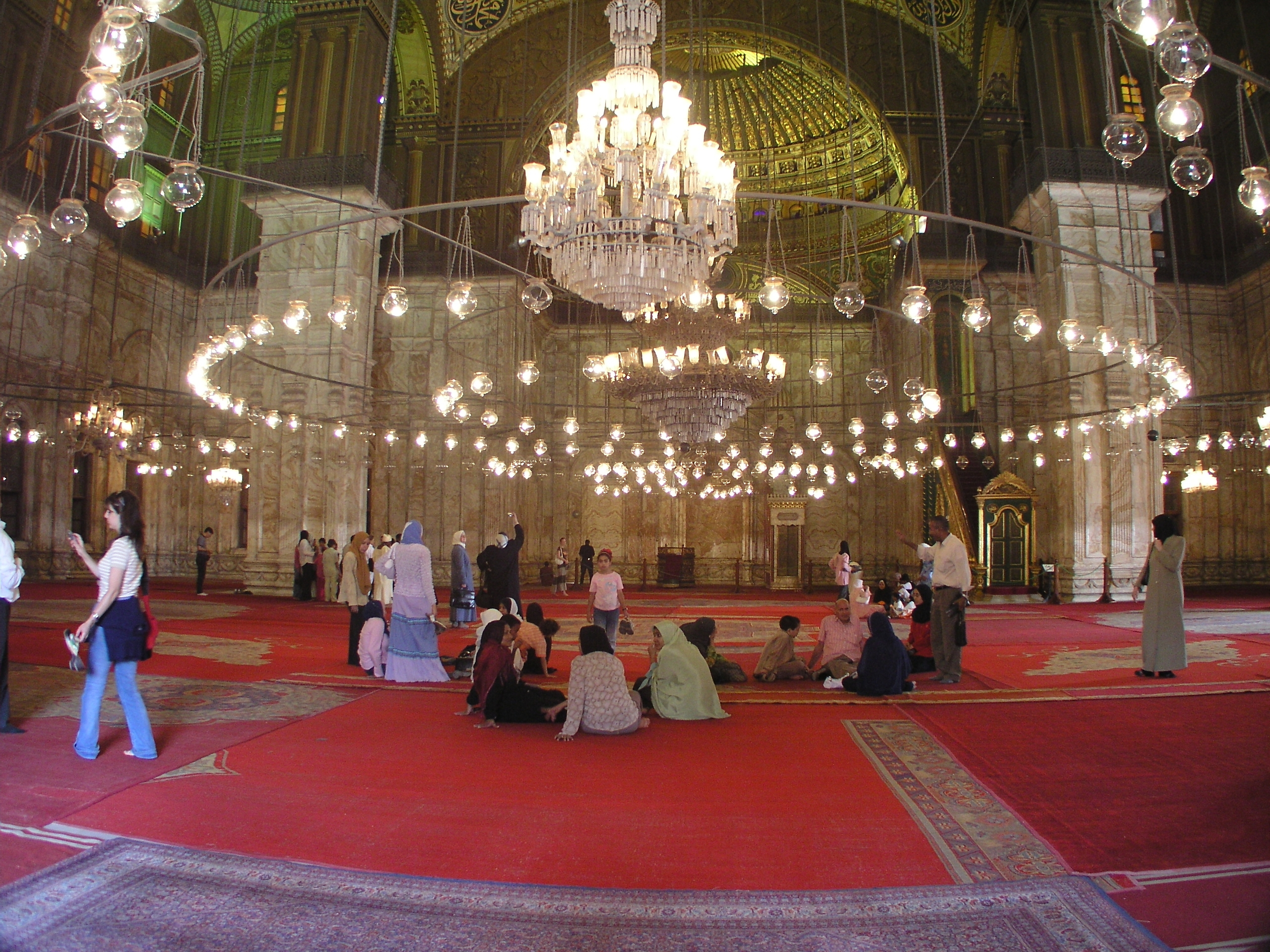 Gebetsraum der Alabastermoschee (eigentl. Mohammed-Ali-Moschee) in Kairo